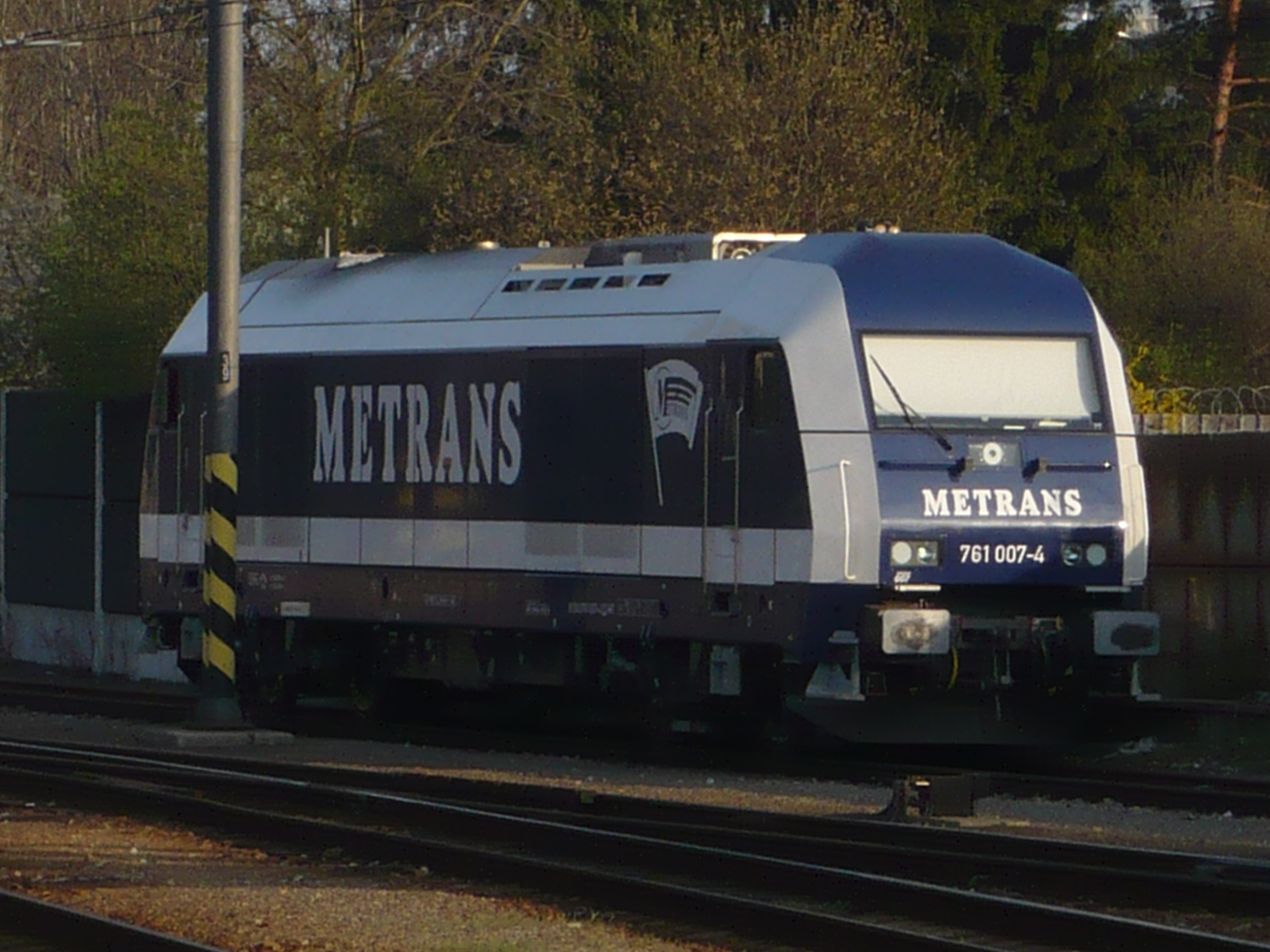 "Bondovka" 761 007 4 dopravce Metrans Rail v železniční stanici Praha Uhříněves (Siemens 21689/2011)